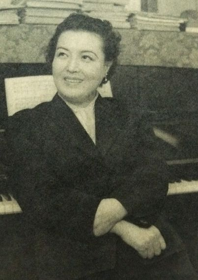 小林千代子